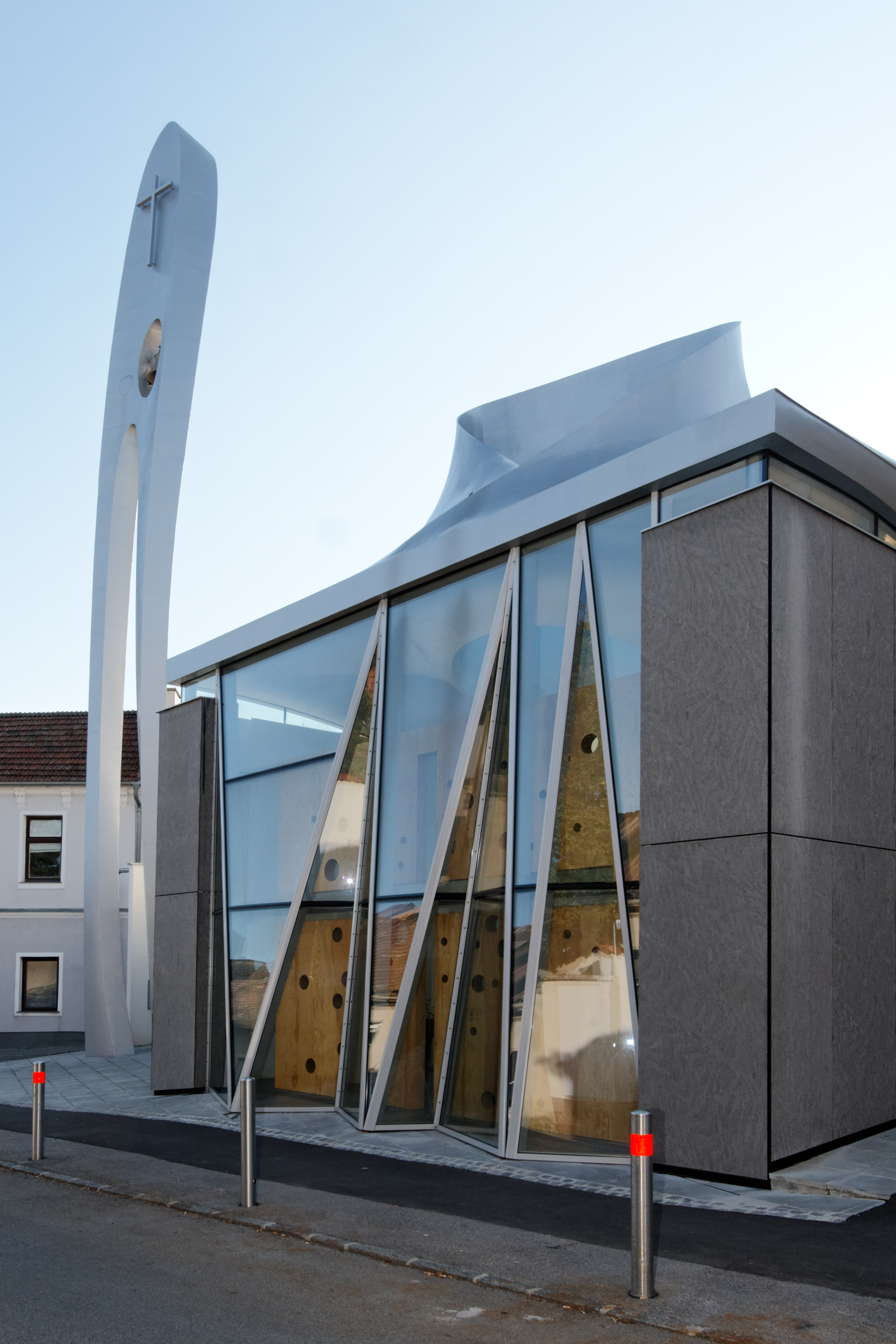 Martin-Luther-Kirche in Hainburg an der Donau (Niederösterreich), errichtet nach Plänen von Wolf D. Prix vom Architekturbüro Coop Himmelb(l)au, eingeweiht am 30. April 2011.